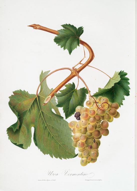 Uva Vermentino (Vernaccia ; Vitis ligustica feracissima) descritta nella « Pomona Italiana » : Trattato degli alberi fruttiferi conteneate la descrizione delle megliori varietàdei frutte coltivati in Italia, accompagnato da figure disegnate, e colorite sul vero, opera di Giorgio Gallesio.